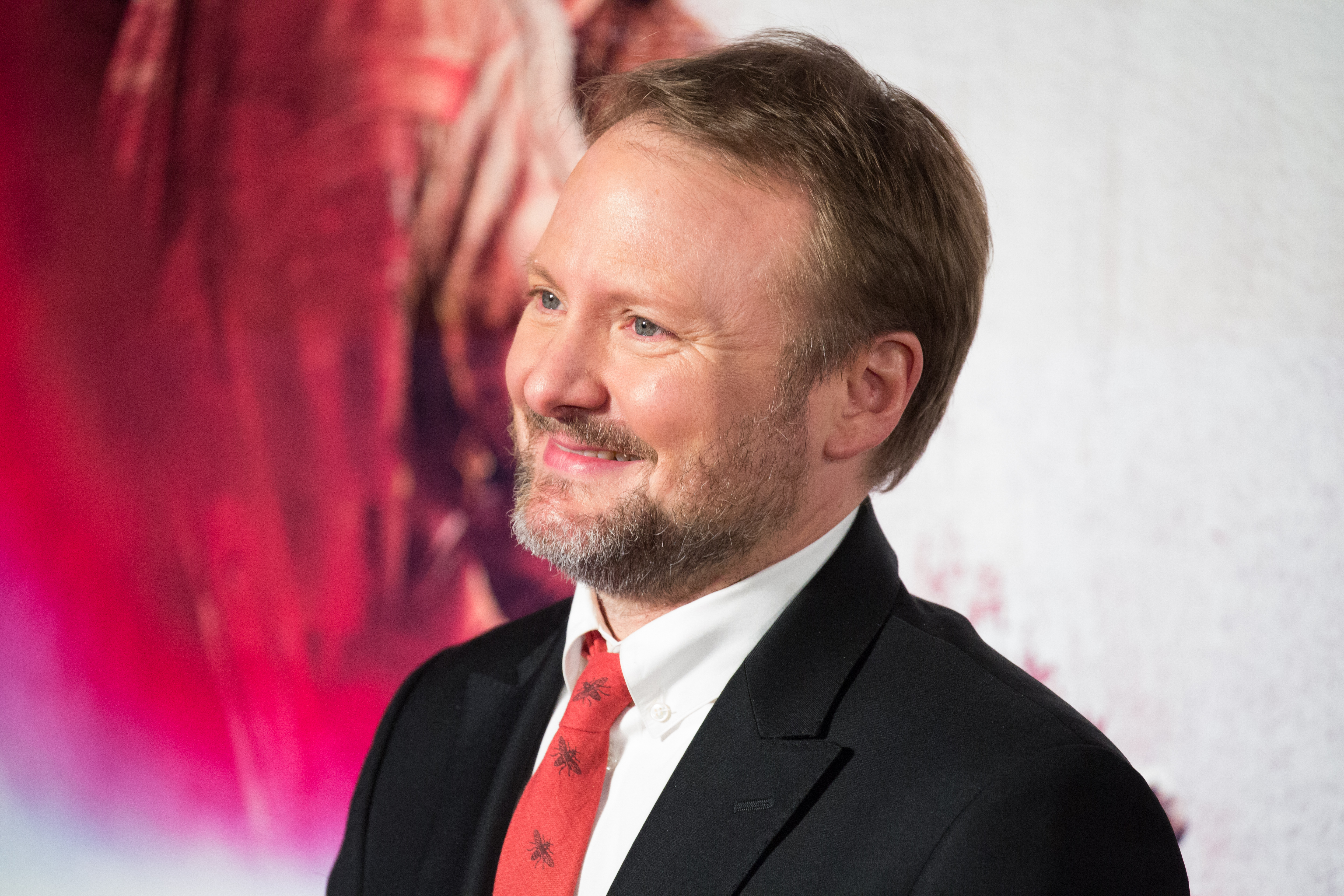 スター・ウォーズ/最後のジェダイ ジャパン・プレミア レッドカーペット ライアン・ジョンソン